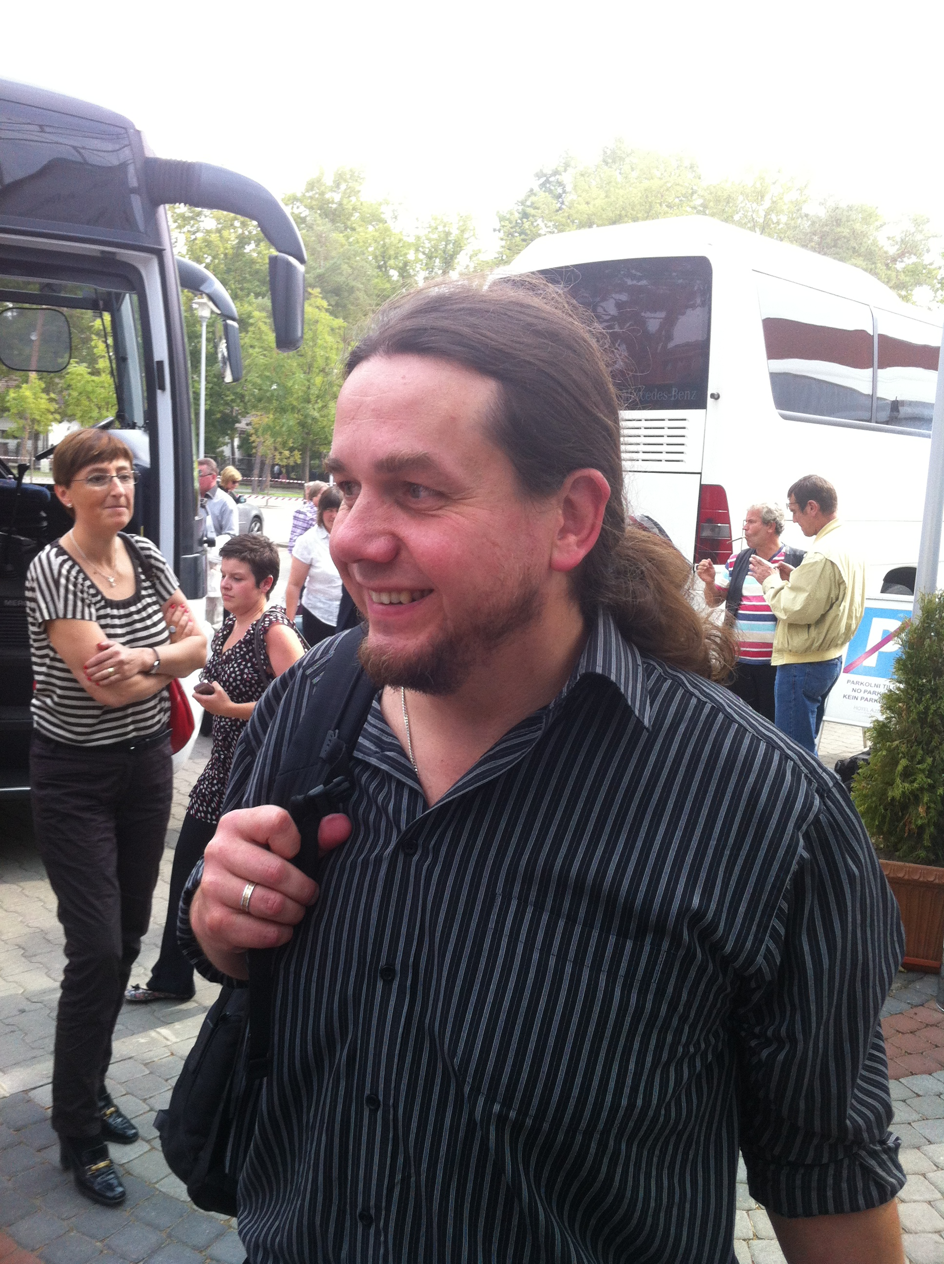 Ahto Kaasik 2012. aastal VI soome-ugri rahvaste maailmakongressil Siófokis.